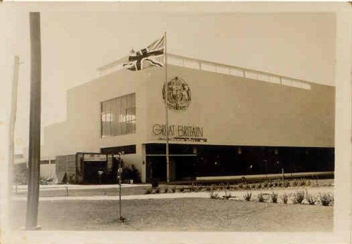 תערוכת "הגמל המעופף" שנערכה בנמל תל אביב אחת למספר שנים.